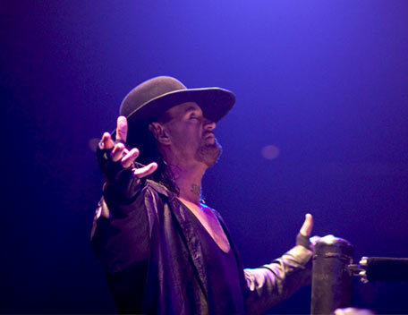 The Undertaker